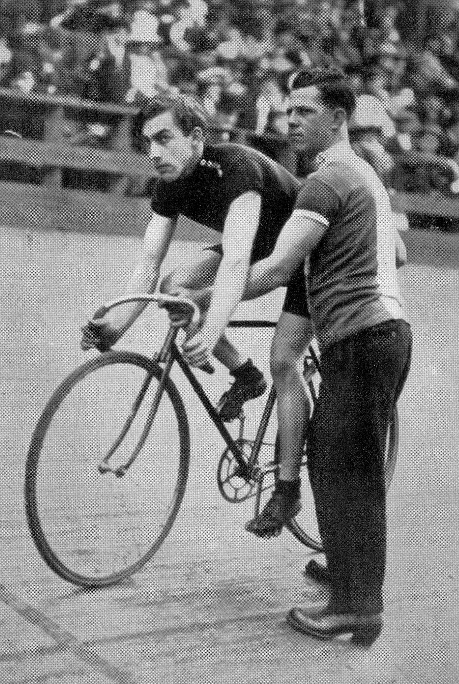 Donald McDougall, US-amerikanischer Radsportler